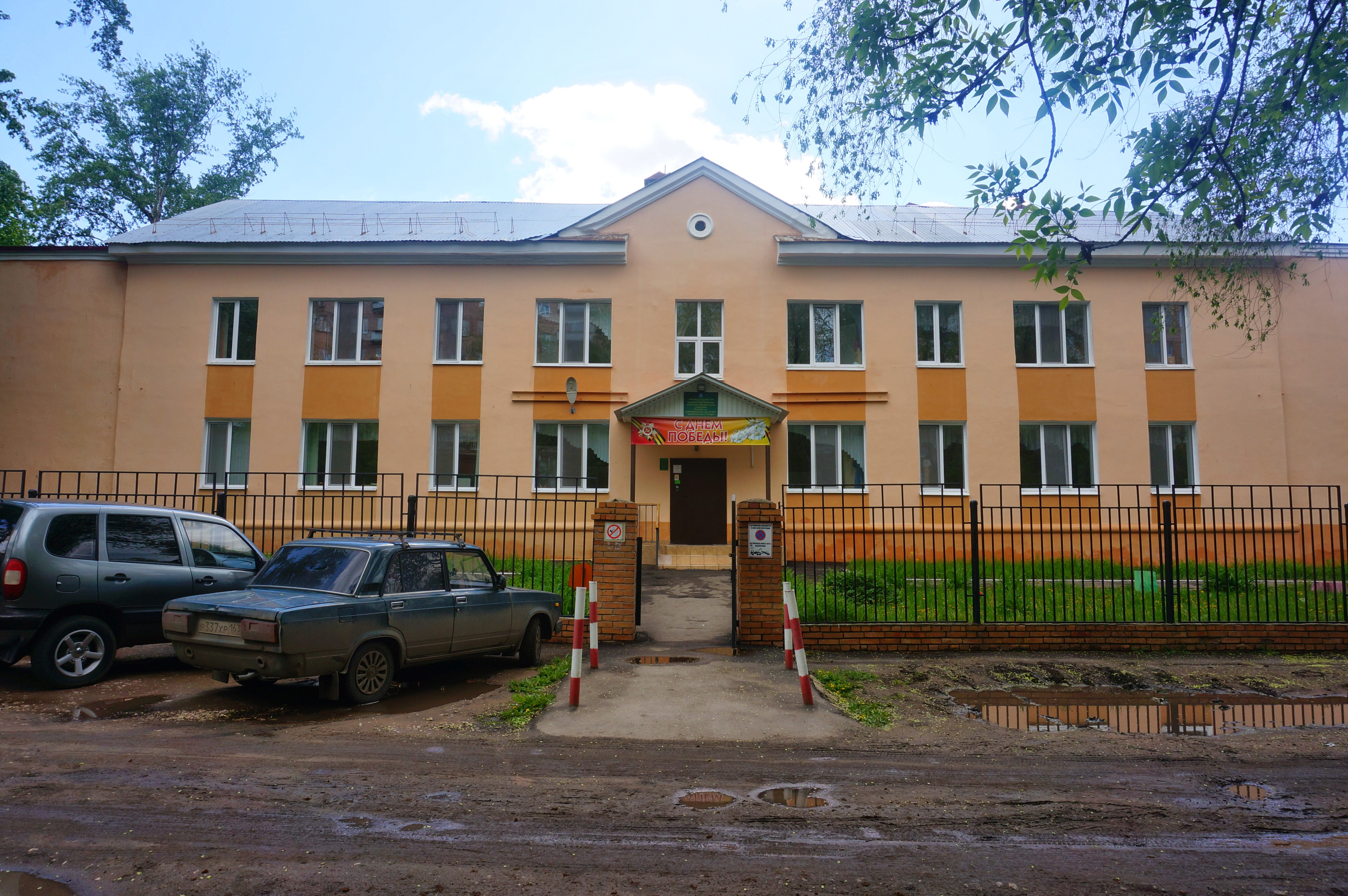 Северный фасад здания по адресу ул. Осипенко 12, Самара. Ныне детский сад № 391, а некогда трапезная Самарского Николаевского мужского монастыря